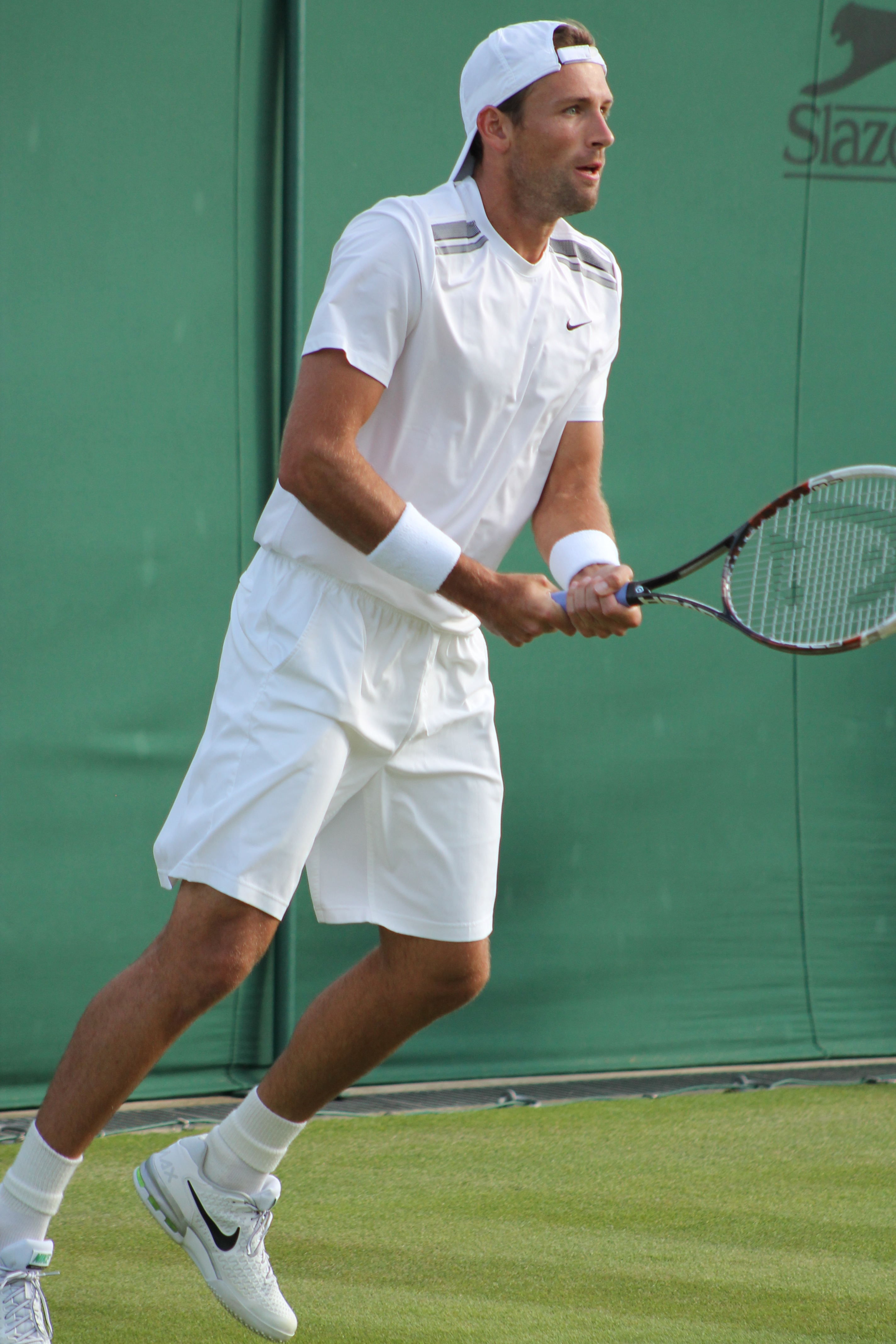 Kubot WM13-026